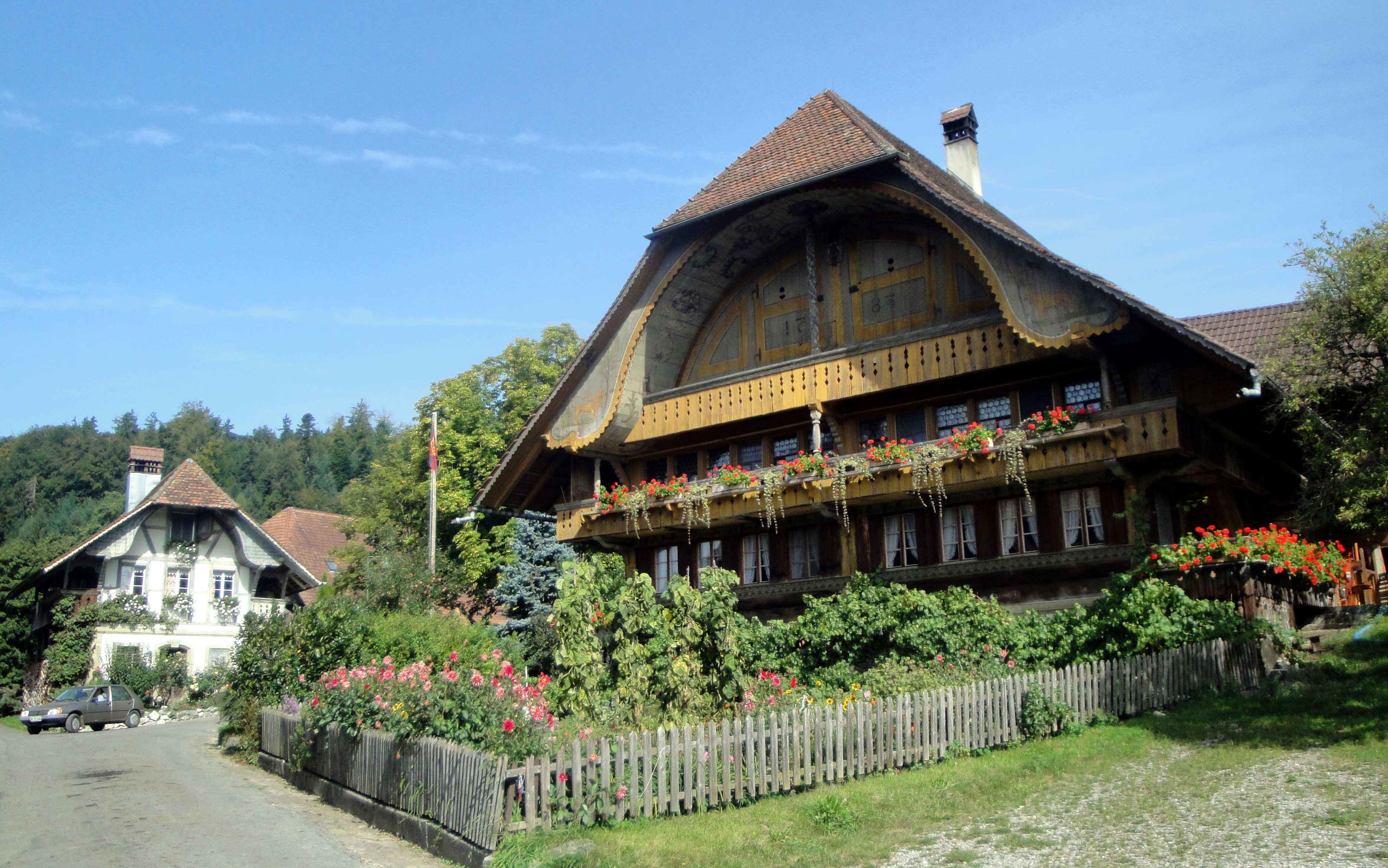 Köniz, Mengestorf, Hof Burren, Bauernhaus